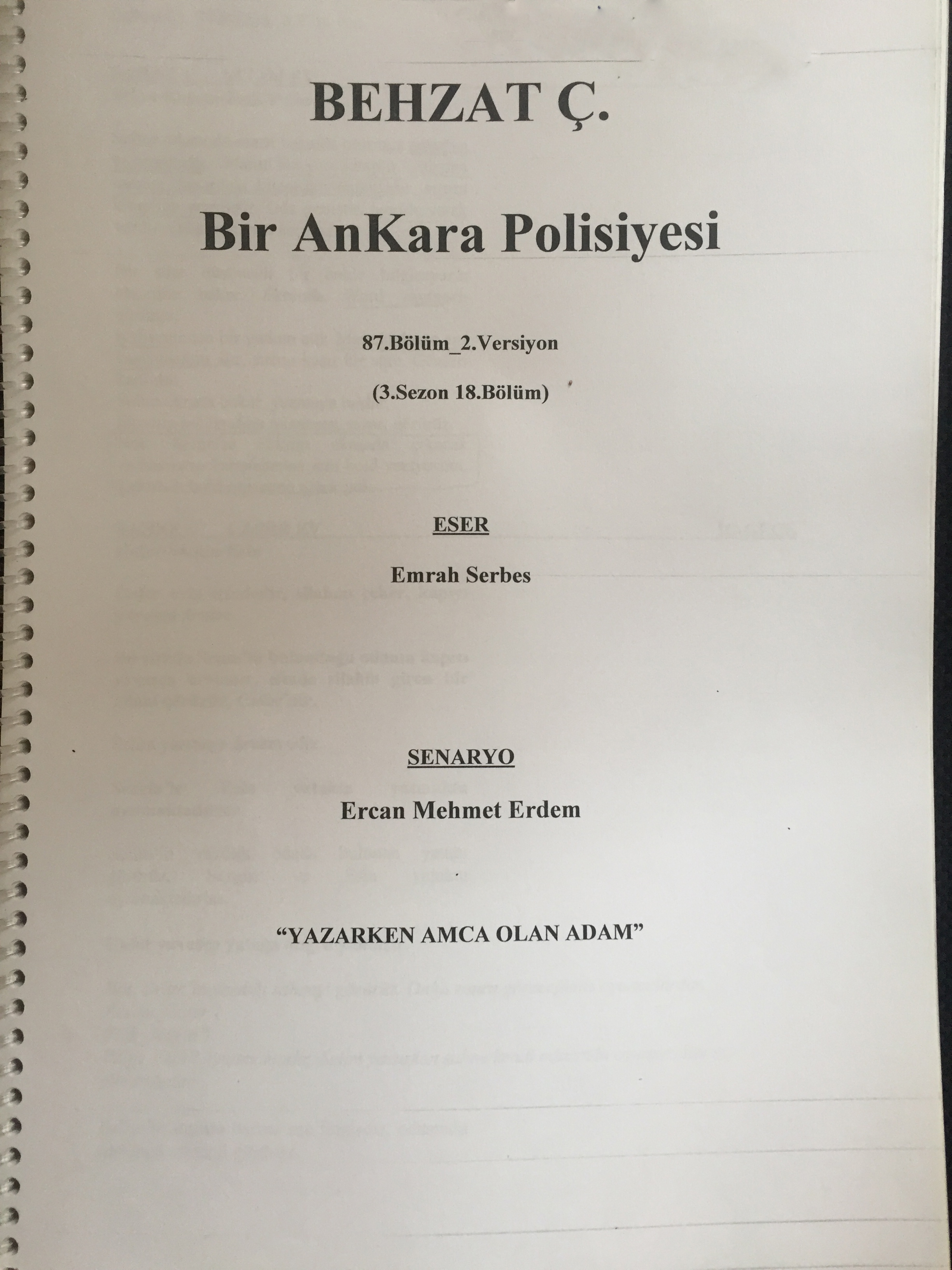 Behzat Ç.: Bir Ankara Polisiyesi dizisinin 87. bölümüne ait senaryonun kapağı.